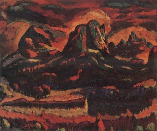 Lazar Drljaca, Le lac Noir sur Durmitor, 1935. huile sur toile, 54,5 x 65,5 cm